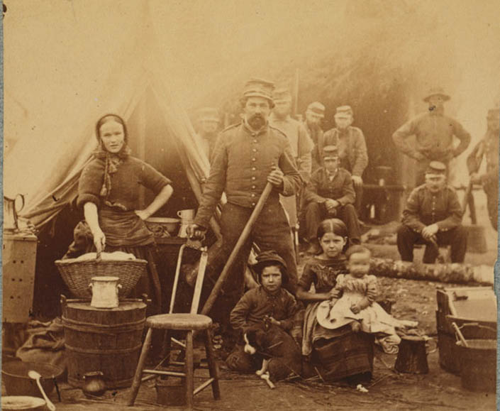 Mathew Brady: Aus der Library of Congress Item 1 of 444 - Full caption: Camp of 31st Pennsylvania Infantry near Washington, D.C. Mathew Brady Studio. 1862, printed later. Prints and Photographs Division. LC-USZC4-7983. Full caption: Camp of 31st Pennsylvania Infantry near Washington, D.C. Mathew Brady Studio. 1862, printed later. Prints and Photographs Division. LC-USZC4-7983. Princess Agnes Salm-Salm, wife of Prince Felix of Prussia, who served with the Union Army, observed in January 1862 that the winter camp of the Army of the Potomac was “teeming with women.” Some wives insisted on staying with their husbands, which may have been the case with this woman, judging by her housewifely pose alongside a soldier, three young children, and a puppy. In addition to taking care of her own family, she may have worked as a camp laundress or nurse. Some women who lacked the marital voucher of respectability were presumed to be prostitutes and were periodically ordered out of camp. Only gradually during the four years of the war, and in the face of unspeakable suffering, were women grudgingly accepted by military officials and the general public in the new public role of nurse.